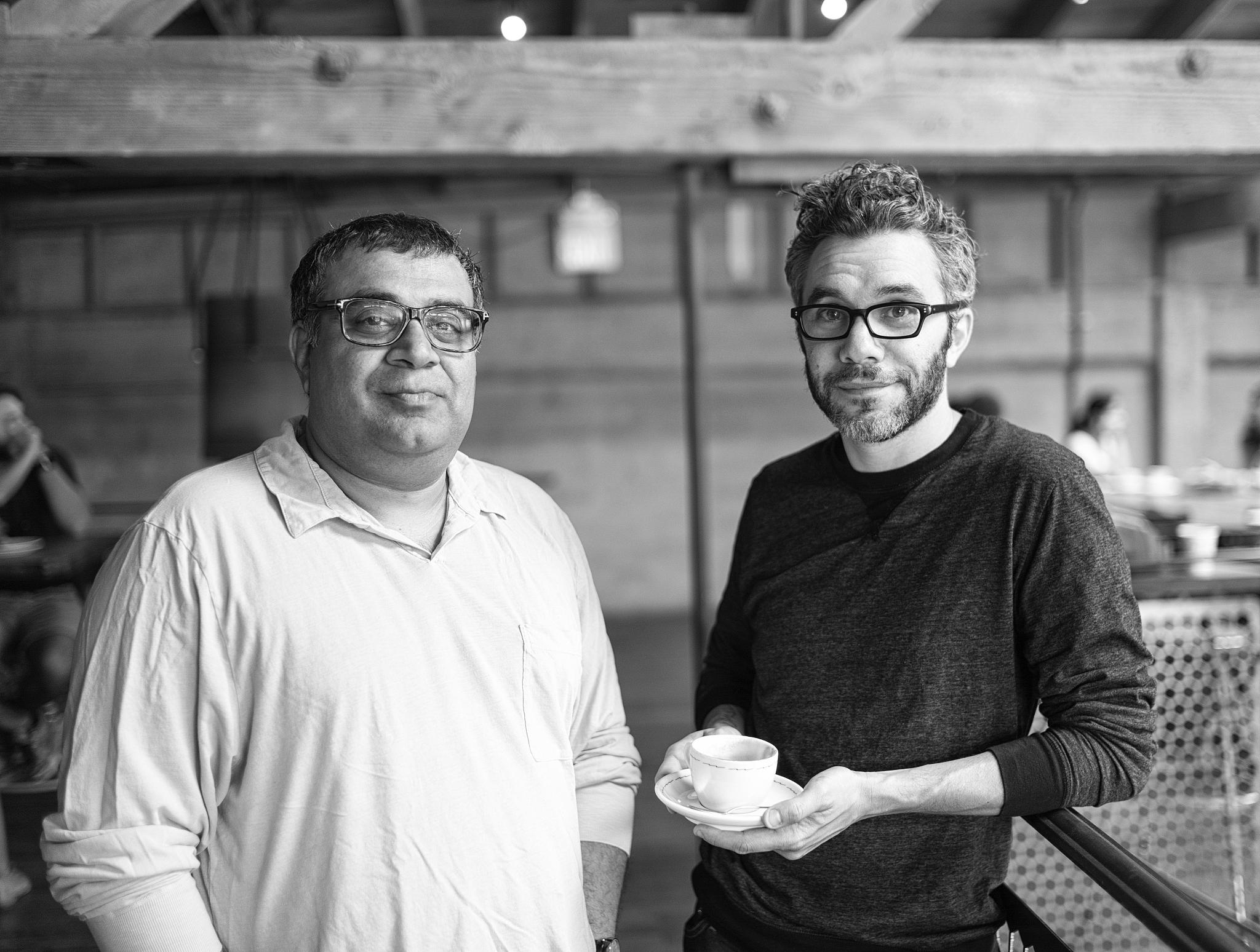 Om Malik & Nick Bilton